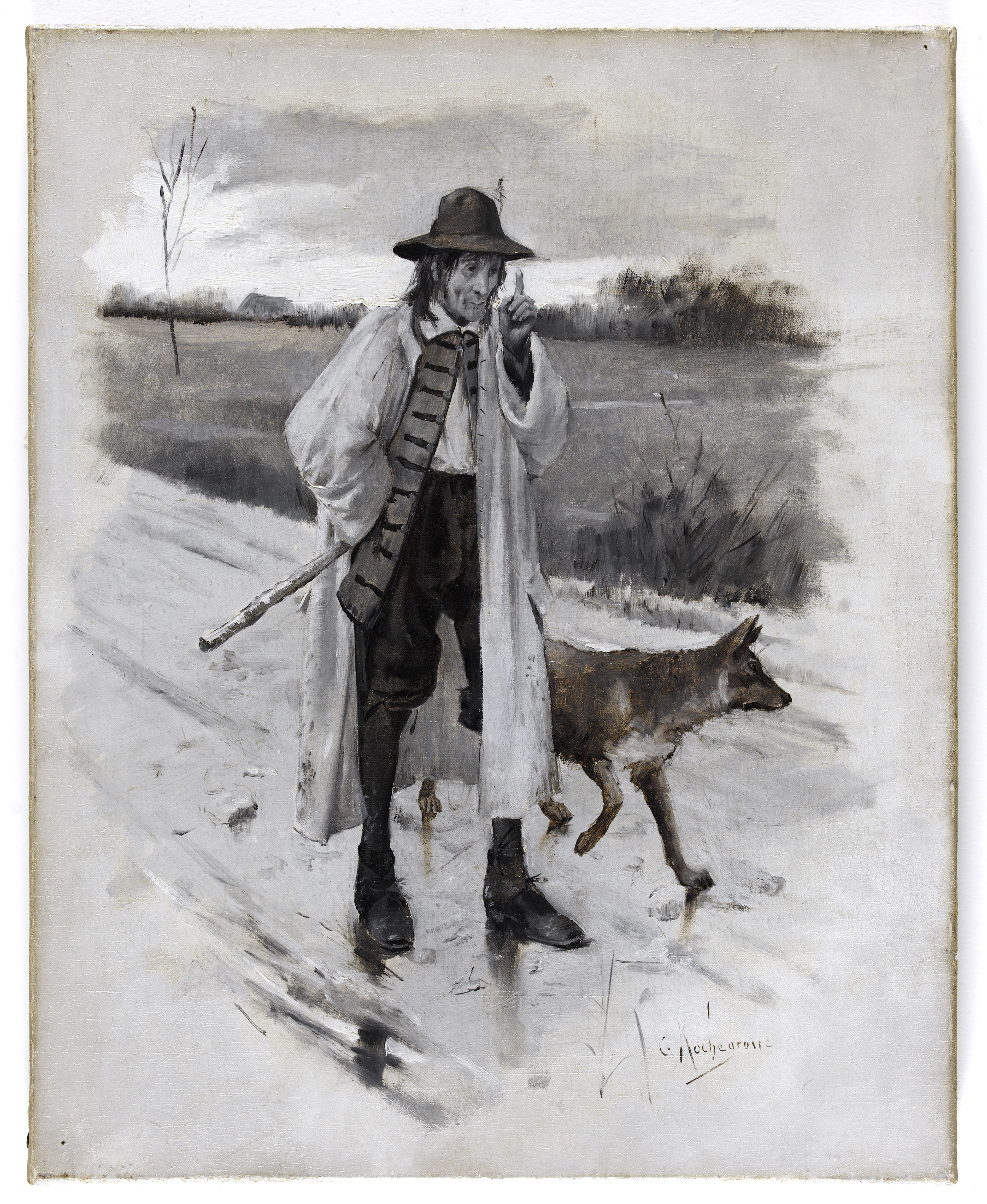 Portrait d'Ursus et Homo. Cette peinture à l'huile de Georges-Antoine Rochegrosse a servi de modèle à la gravure de Fortuné Méaulle reproduite en page 5 du roman de Victor Hugo, L'Homme qui rit, dans l'Édition Hugues (1886). L'illustration correspond au texte de la première partie « La mer et la nuit », Livre I « Deux chapitres préliminaires », chapitre I, « Ursus ».